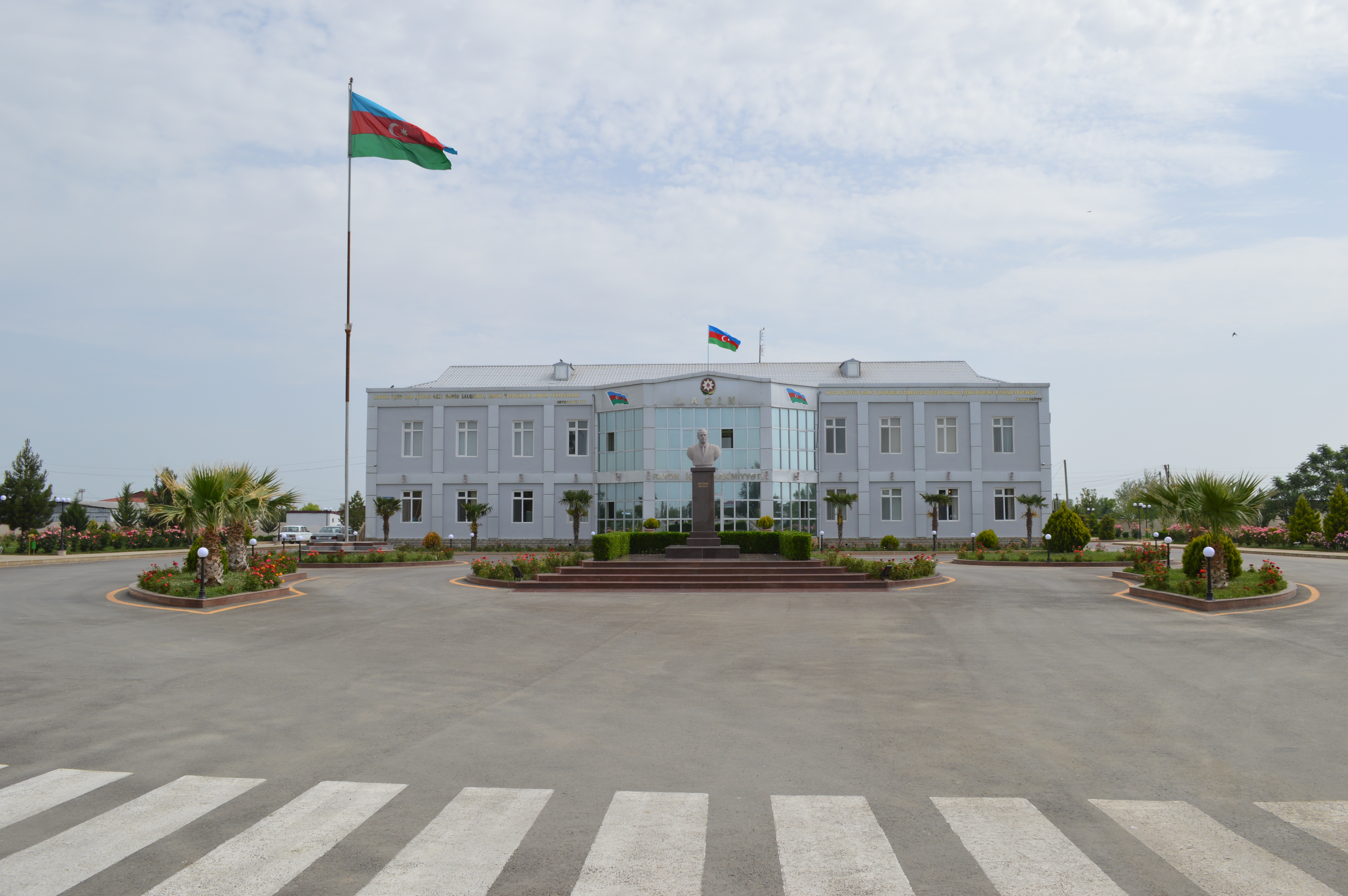 Laçın Rayon İcra Hakimiyyətinin binası